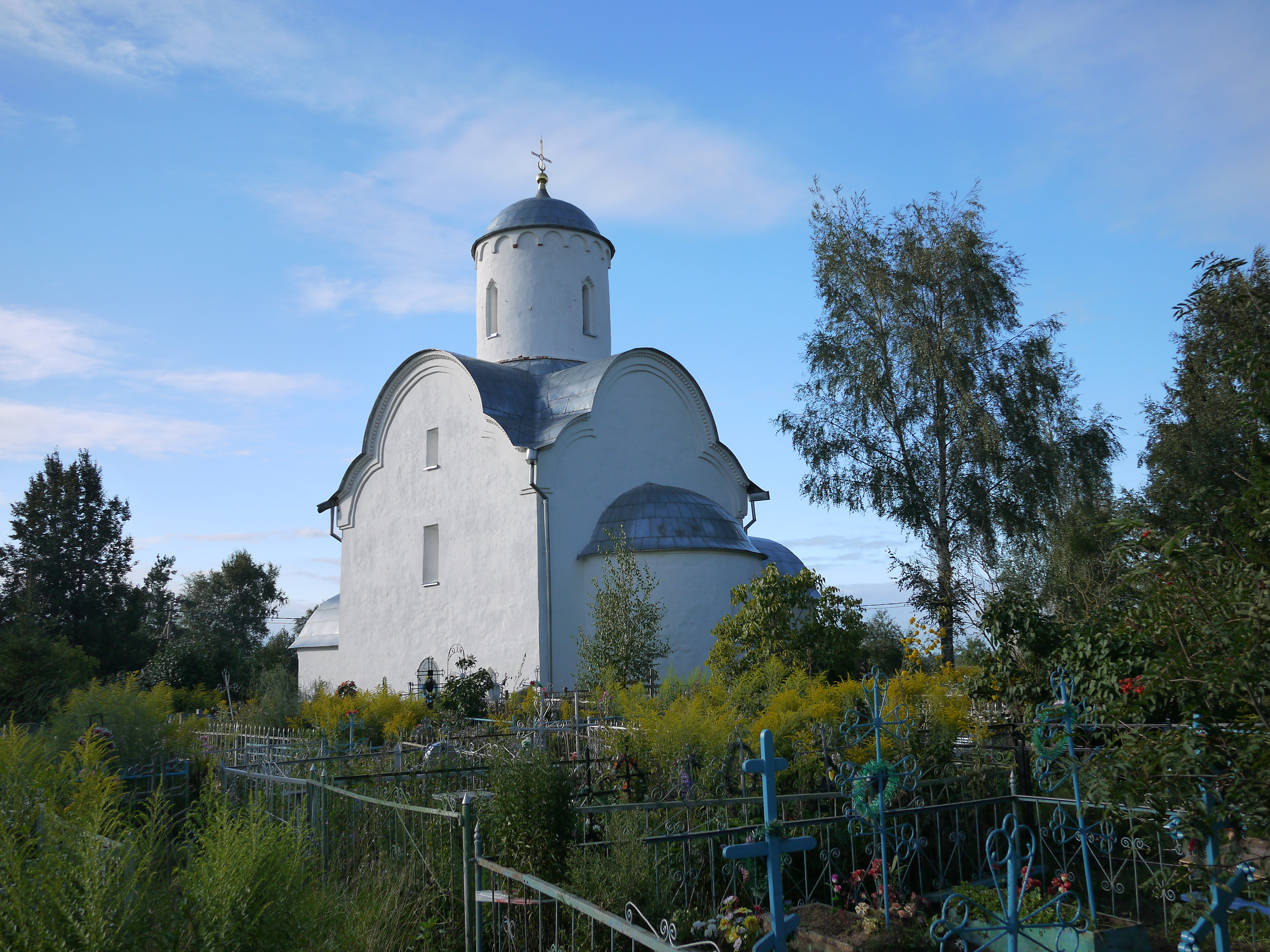 Церковь Успения Пресвятой Богородицы на Волотове (Новгородская область, Великий Новгород, деревня Волотово)